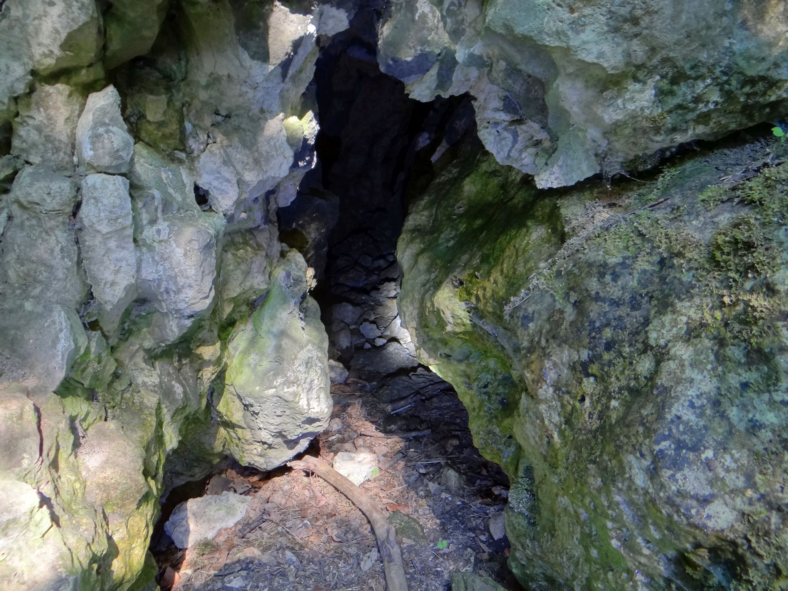 Dziurawiec na Tomaszówkach Dolnych